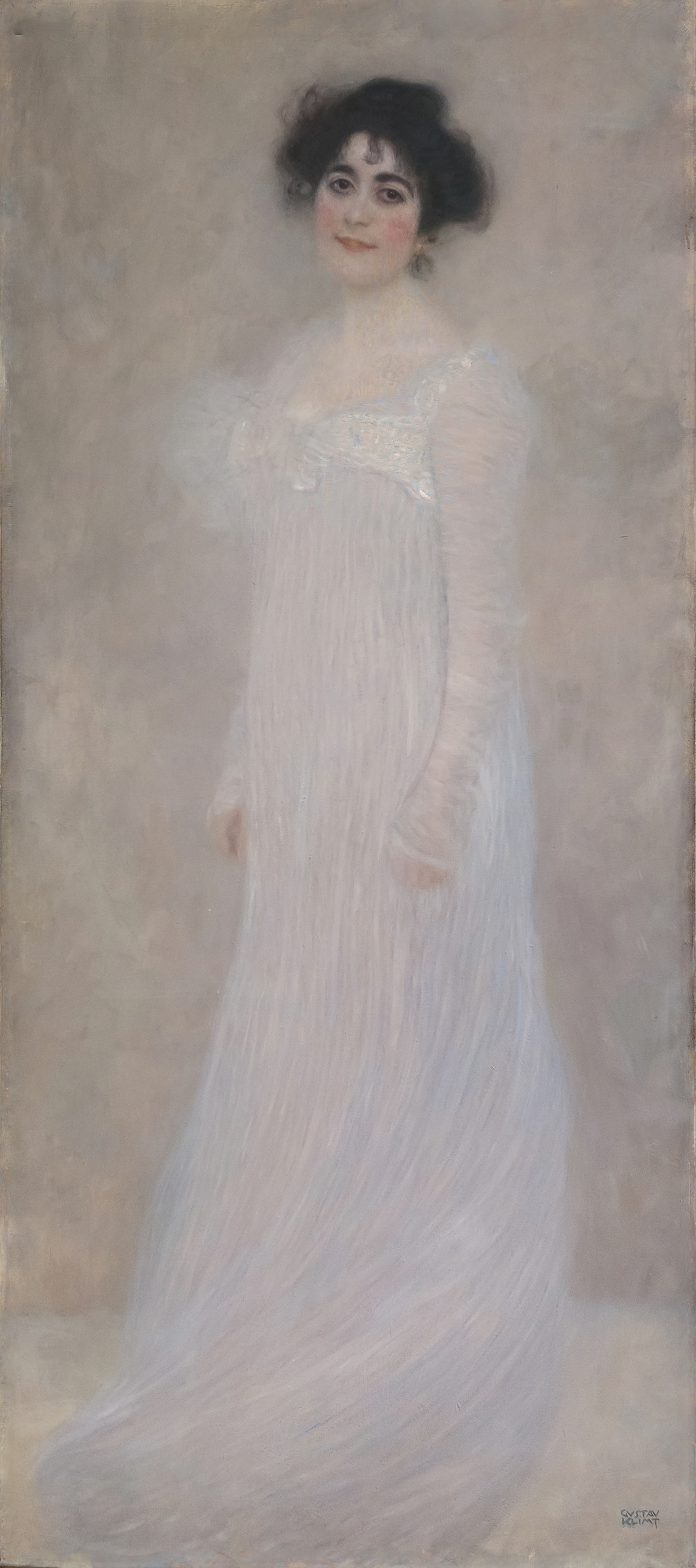 Serena Pulitzer Lederer